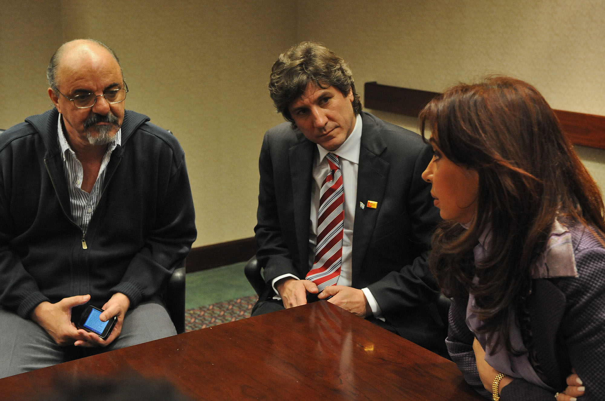 La Presidenta, junto al ministro de Trabajo, Carlos Tomada, y el de Economía, Amado Boudou, luego de reunirse con líderes sindicales mundiales.